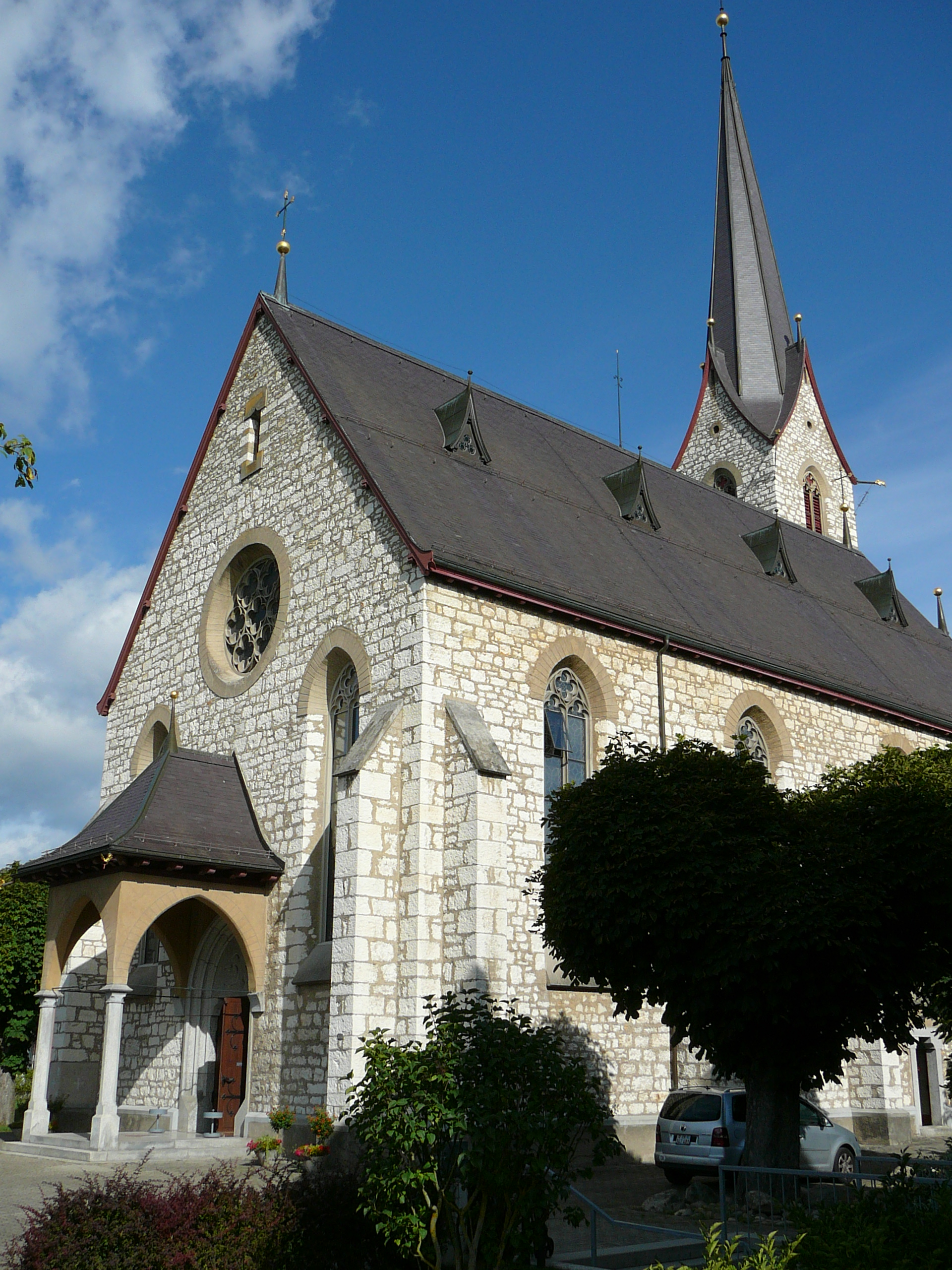 Römisch-katholische Dreifaltigkeitskirche Bülach